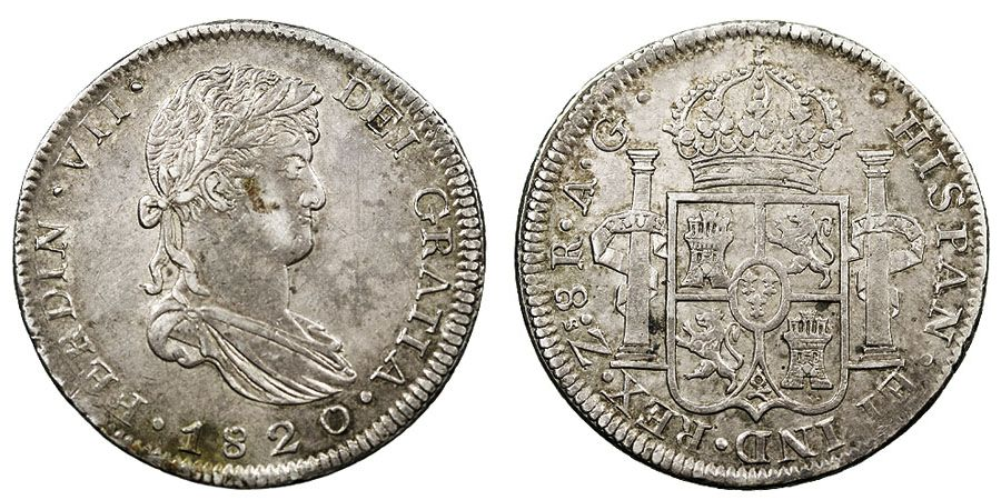 Moneda de vuit rals encunyada en 1820 al regnat de Ferran VII d'Espanya. És una peça de plata fabricada a Zacatecas.